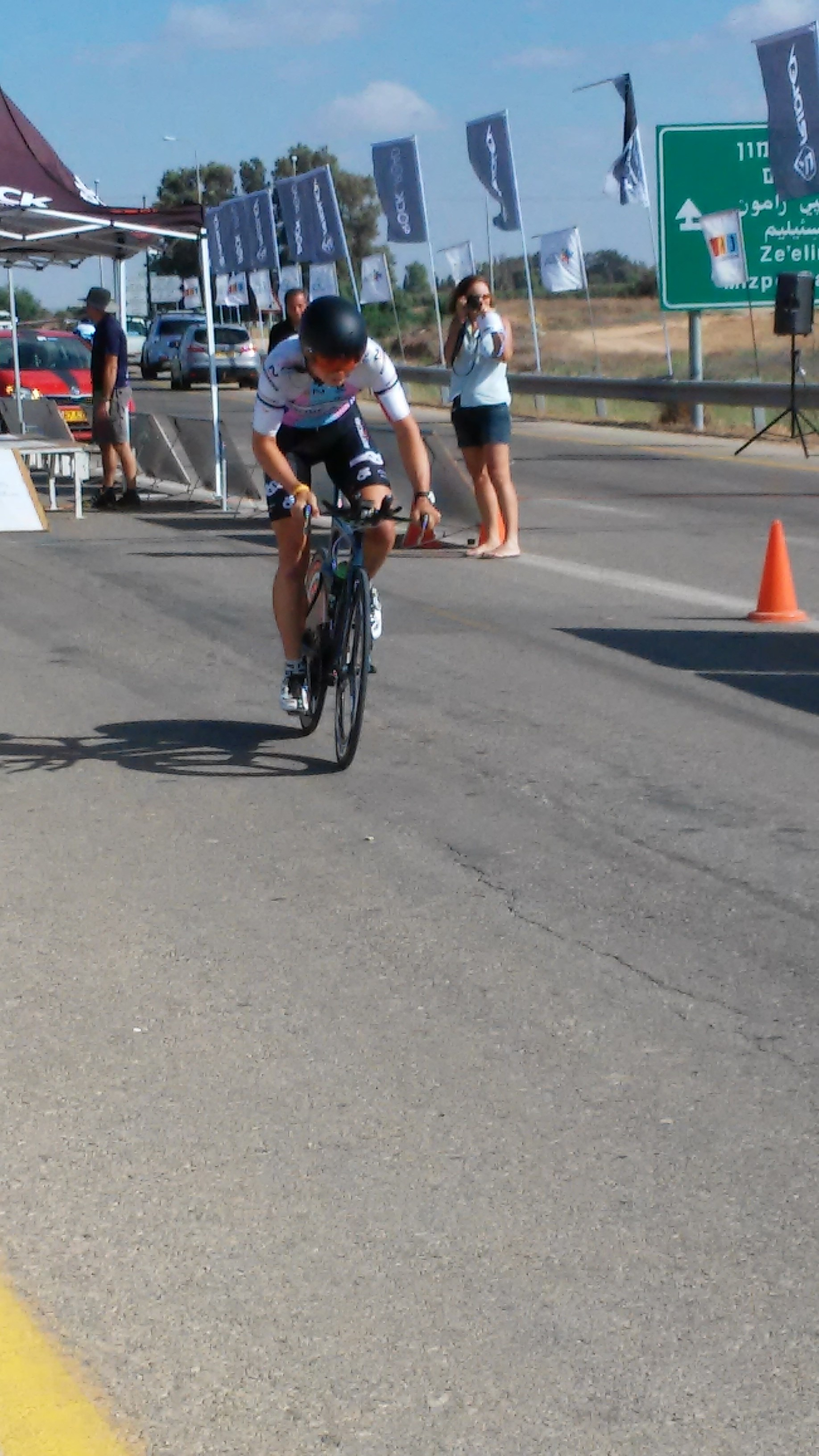 אנטון מיכאלוב מזנק למרוץ נגד השעון, אליפות ישראל 2015, אורים